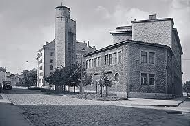 Arhitekt Herbert Johanson, ehitatud1936-38. aastal ehitatud (torn valmis 1939. aastal)